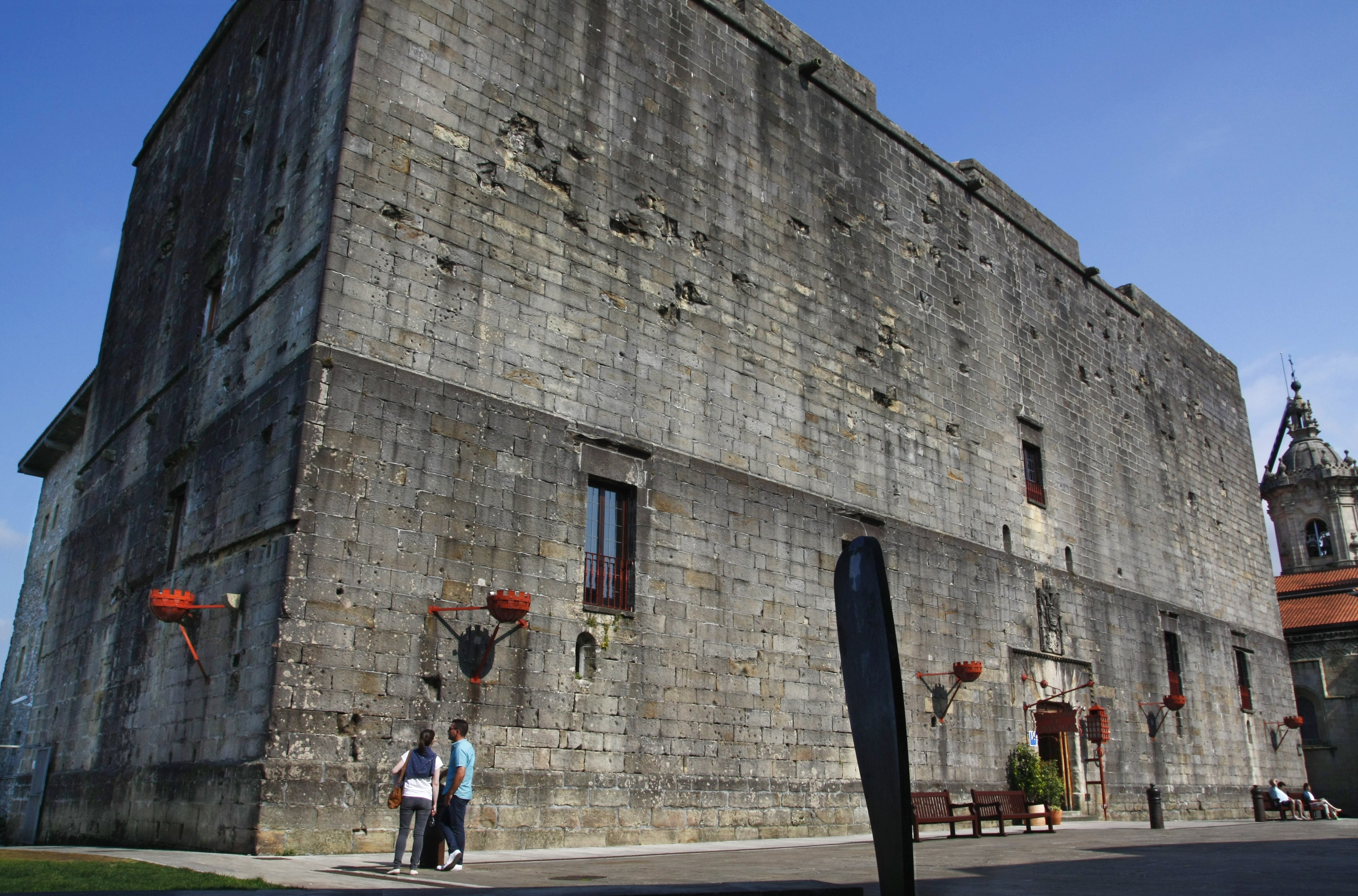 Hondarribia - Parador